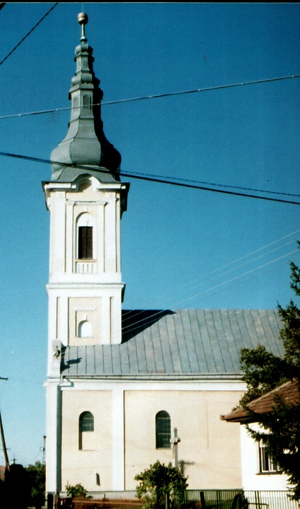 Fábiánháza, görögkatolikus templom (Szabolcs-Szatmár-Bereg)